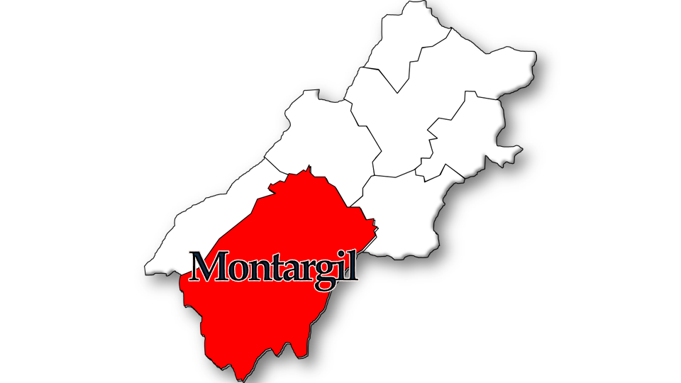 Evolução da População